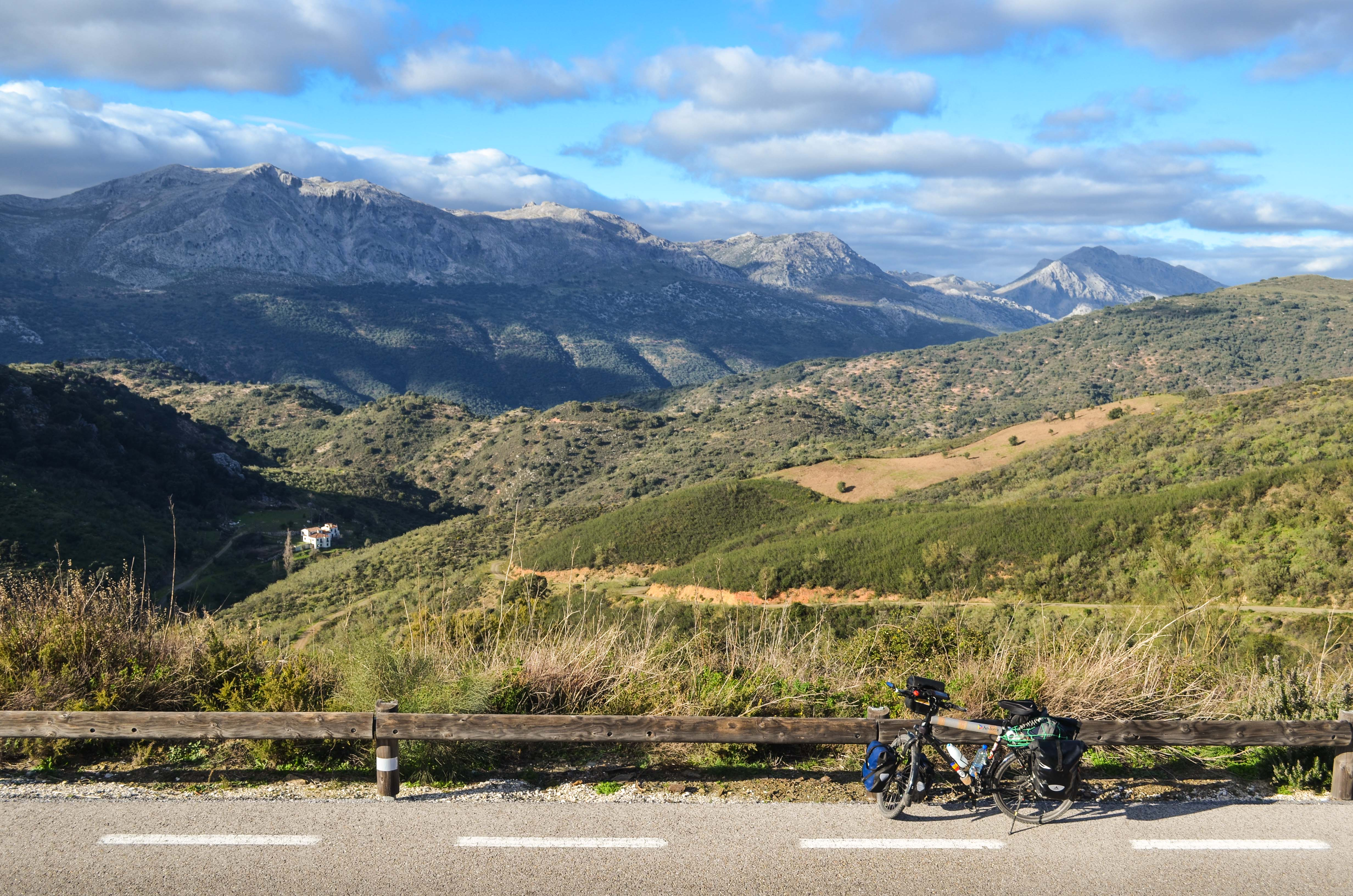 Valle del Genal